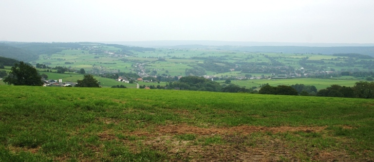 Tancremont vu op Dierfer.